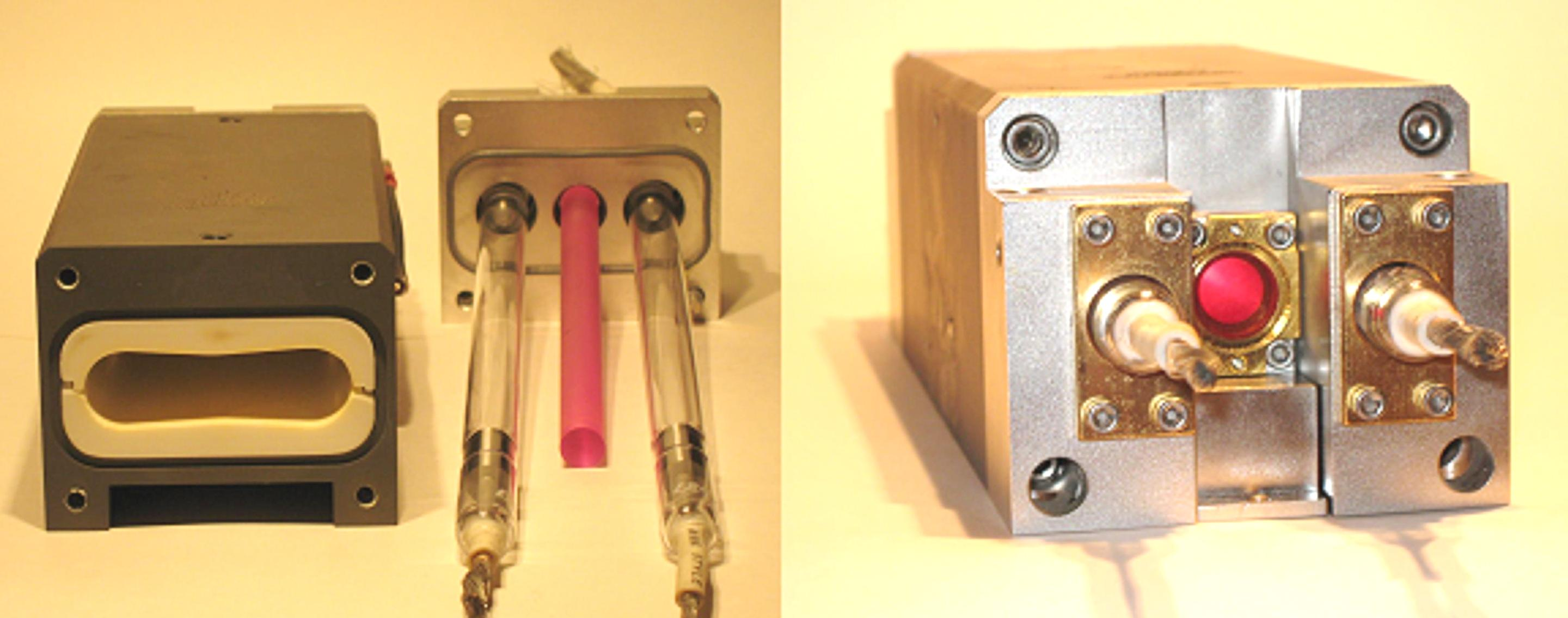 На этой фотографии показана головка рубинового лазера. На левом снимке головка разобрана, лампы-вспышки слева и справа от рубинового стержня. Размеры стержня 150 мм на 10 мм такие же, как длина и диаметр дуги лампы-вспышки. На Снимке справа показана собранная головка без зеркал.